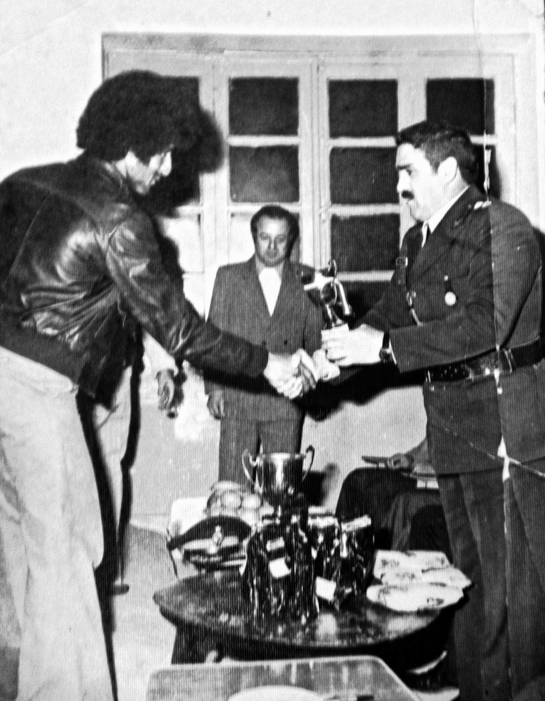 علی اکبر نیکویی کاپیتان وقت تیم نساجی مازندران پیش از انقلاب اسلامی در حال دریافت کاپ